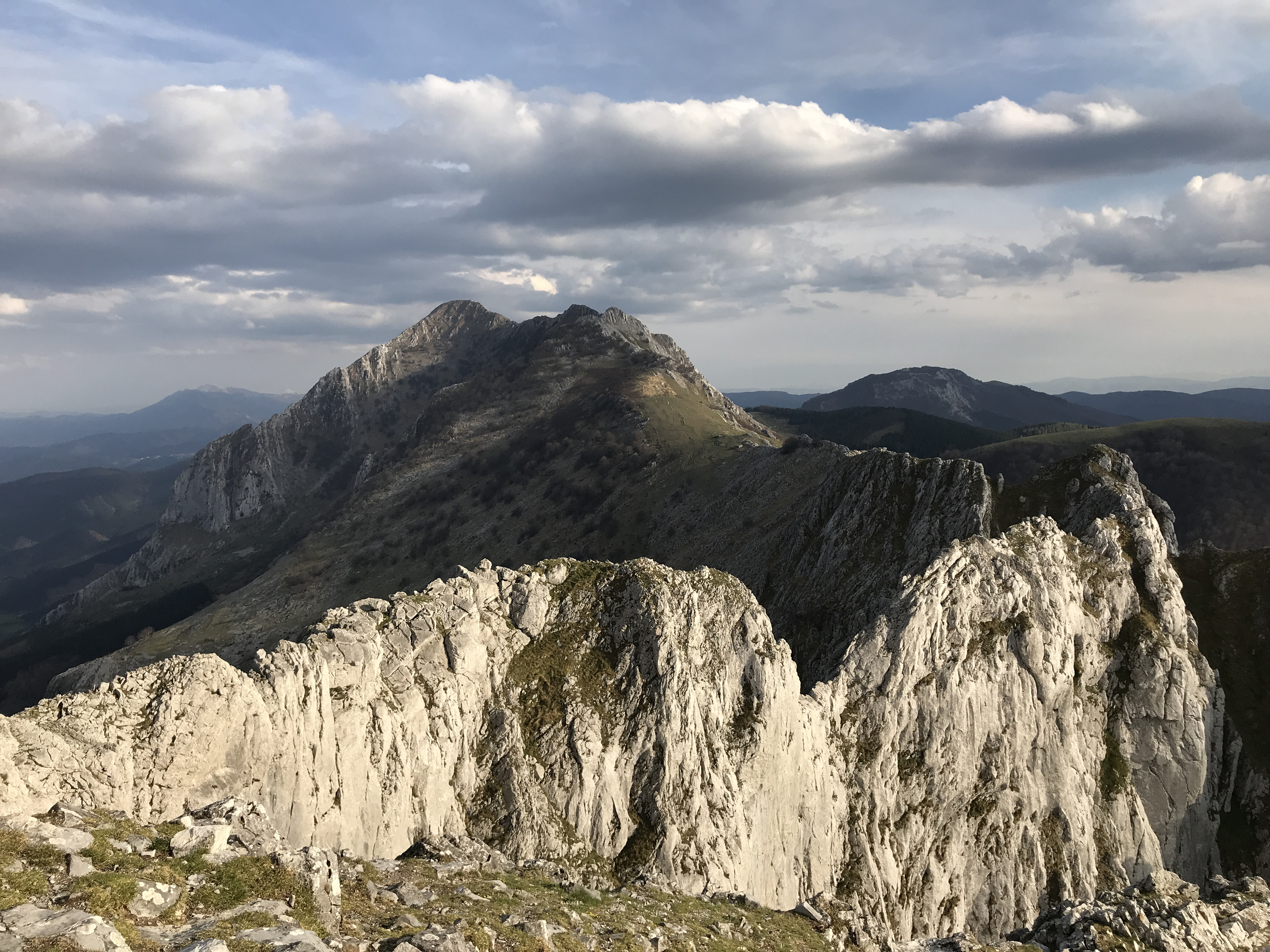 Vista del cordal del Anboto desde la cumbre del Alluitz. Se aprecia el paso del Diablo. En Abadiño, Bizkaia País Vasco (España)